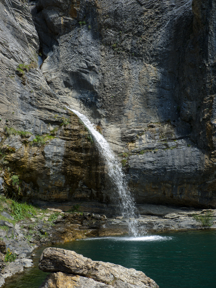 Salto de Escarrilla This is a photography of a Site of Community Importance in Spain with the ID: ES2410031. Natura2000 entry, EEA entry